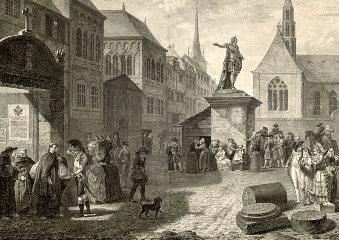 Carl Gottlieb Guttenberg (1743–1790) nach Léonard Defrance (1735–1805): Aufhebung der Klöster unter Joseph II. im Jahre 1782. Radierung und Stichel, 48,8 x 62,7 cm. Bibliotèque nationale de France, P 21849. (Original: Öl auf Leinwand, 49,5 x 60,5 cm. Privatsammlung, Herstal.)